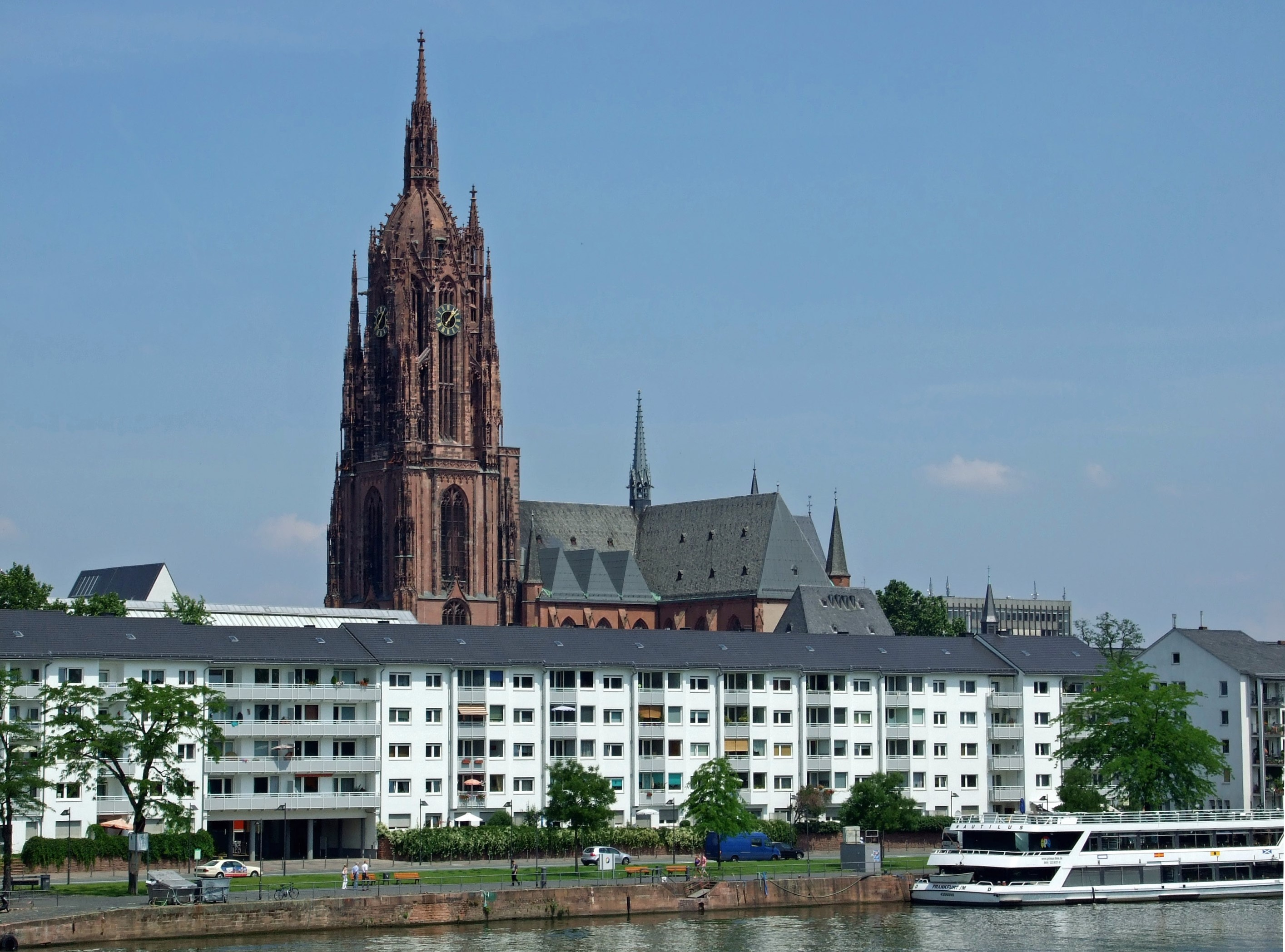 Dom in Ffm